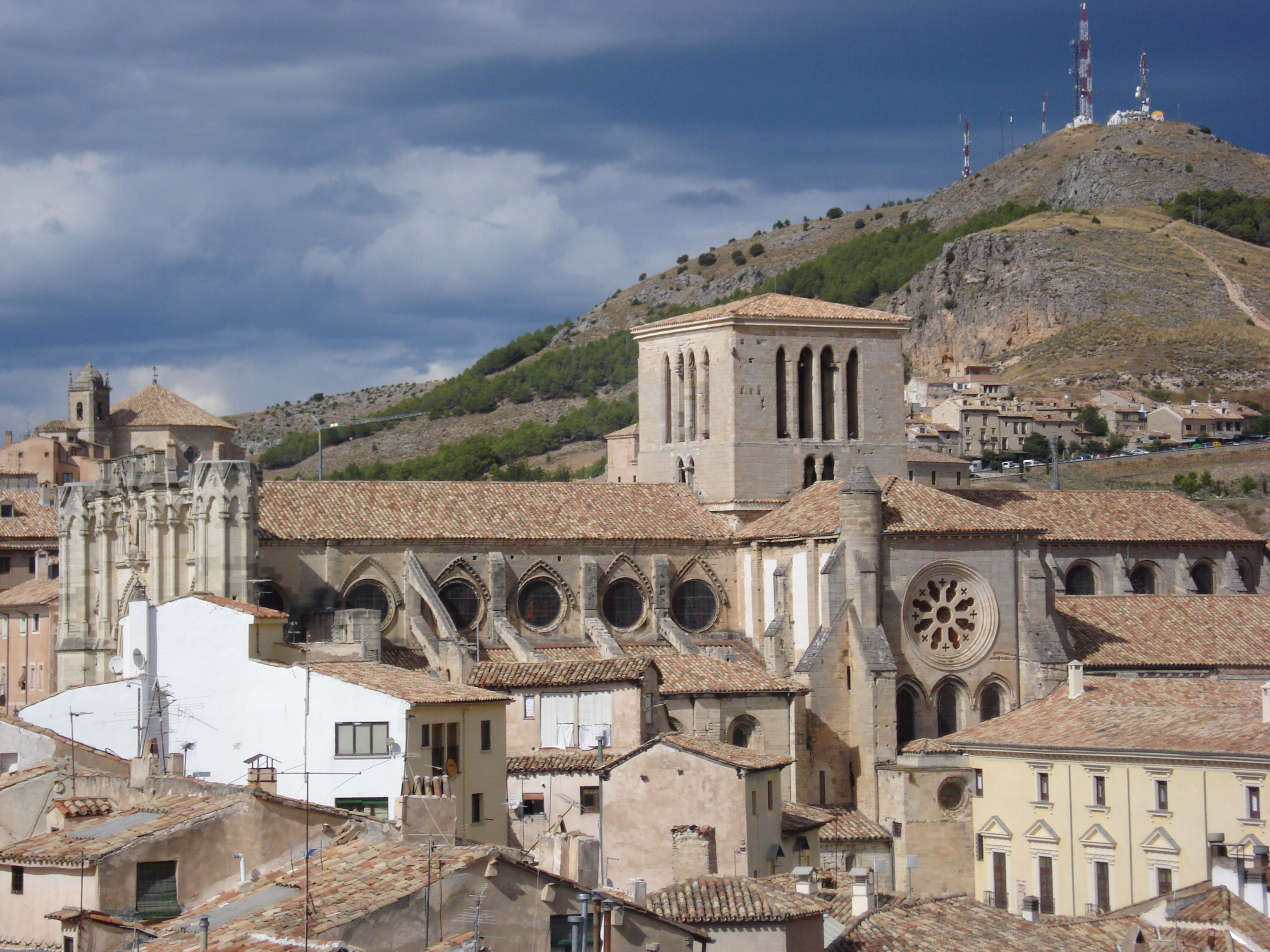 Catedral de Cuenca, España.